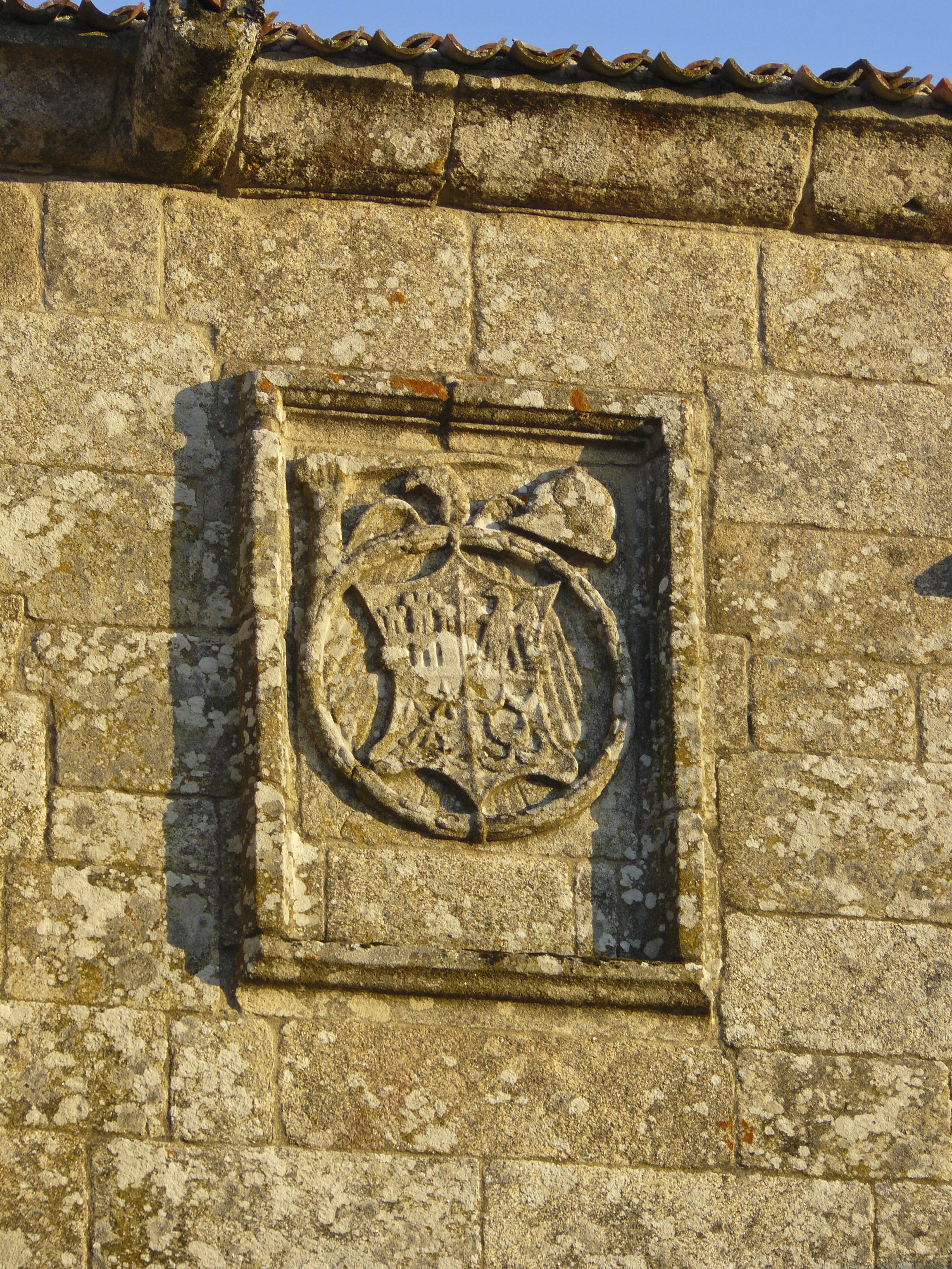 Escudo do Castelo de Vilamarín